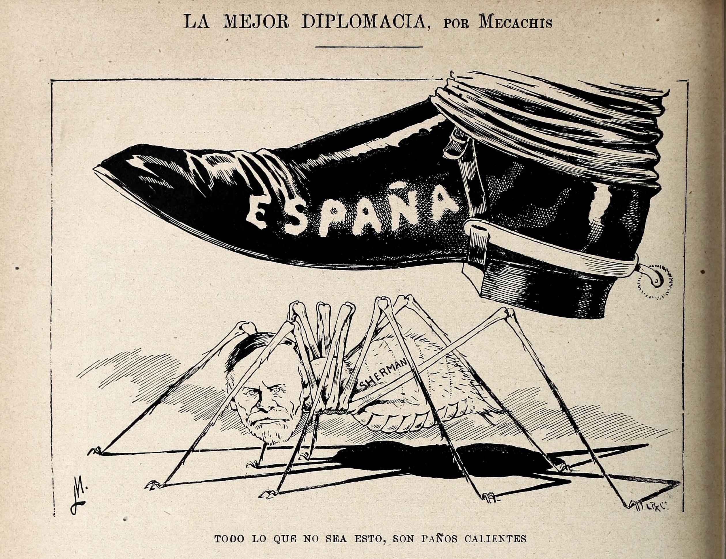 La mejor diplomacia. Todo lo que no sea esto, son paños calientes. Mecachis.